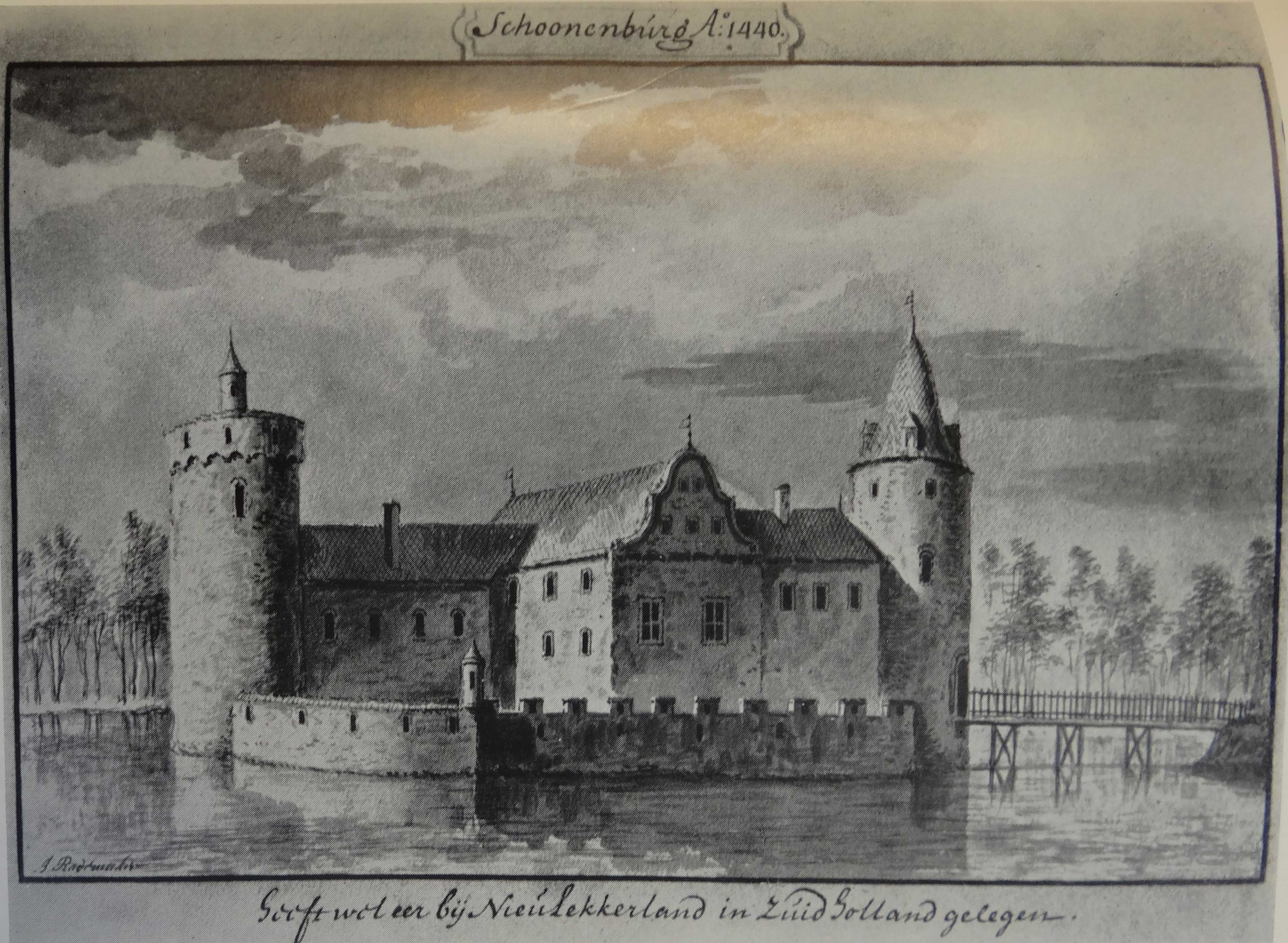 18e eeuwse prent van het omstreeks 1450 verwoeste kasteel Schoonenburg gelegen op de Schoonenburger heuvel op de grens van Nieuw-Lekkerland en Streefkerk, of de afbeelding historisch correct is wordt betwijfeld